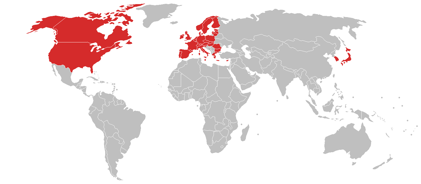 Carte illustrant en rouge les pays de la Triade.